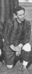 Juan Francia con la casaca de la Selección Rosarina